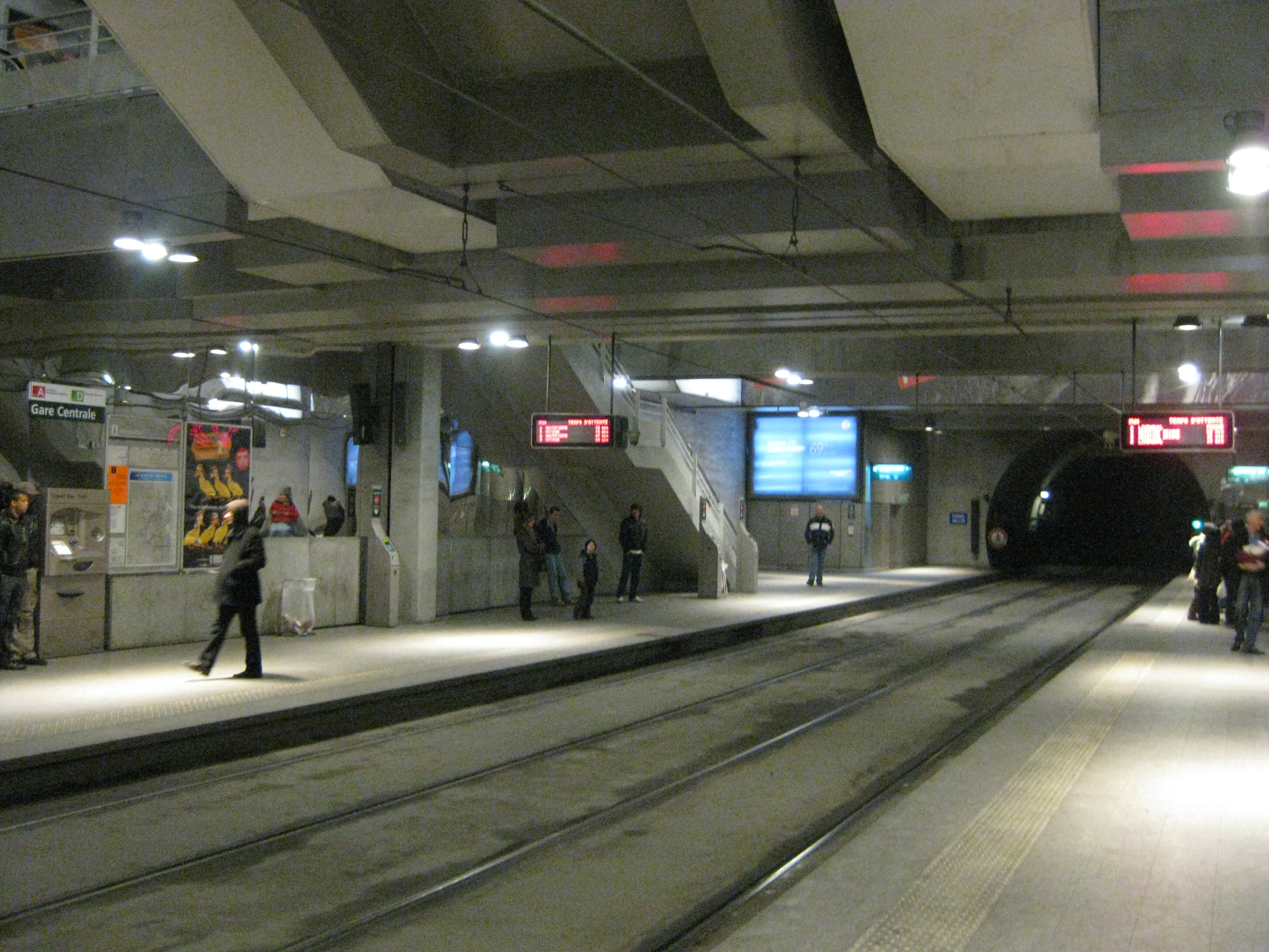 Tram Gare Centrale à Strasbourg